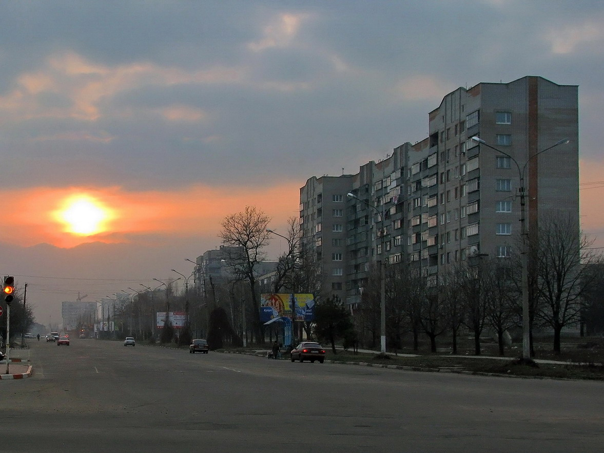 Никополь, улица Первомайская